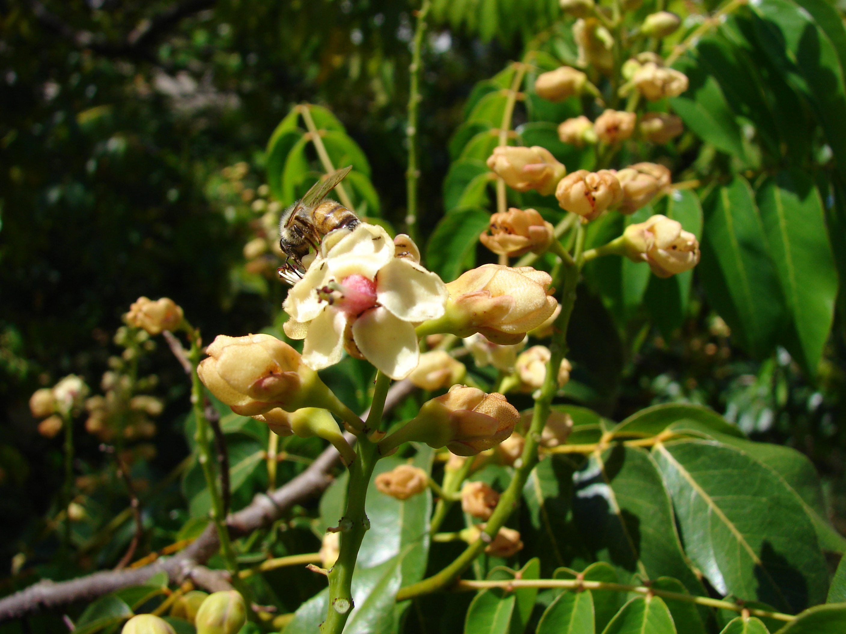 Stahlia monosperma, Cobana Negra Location, Puerto Rico Photo by USFWS